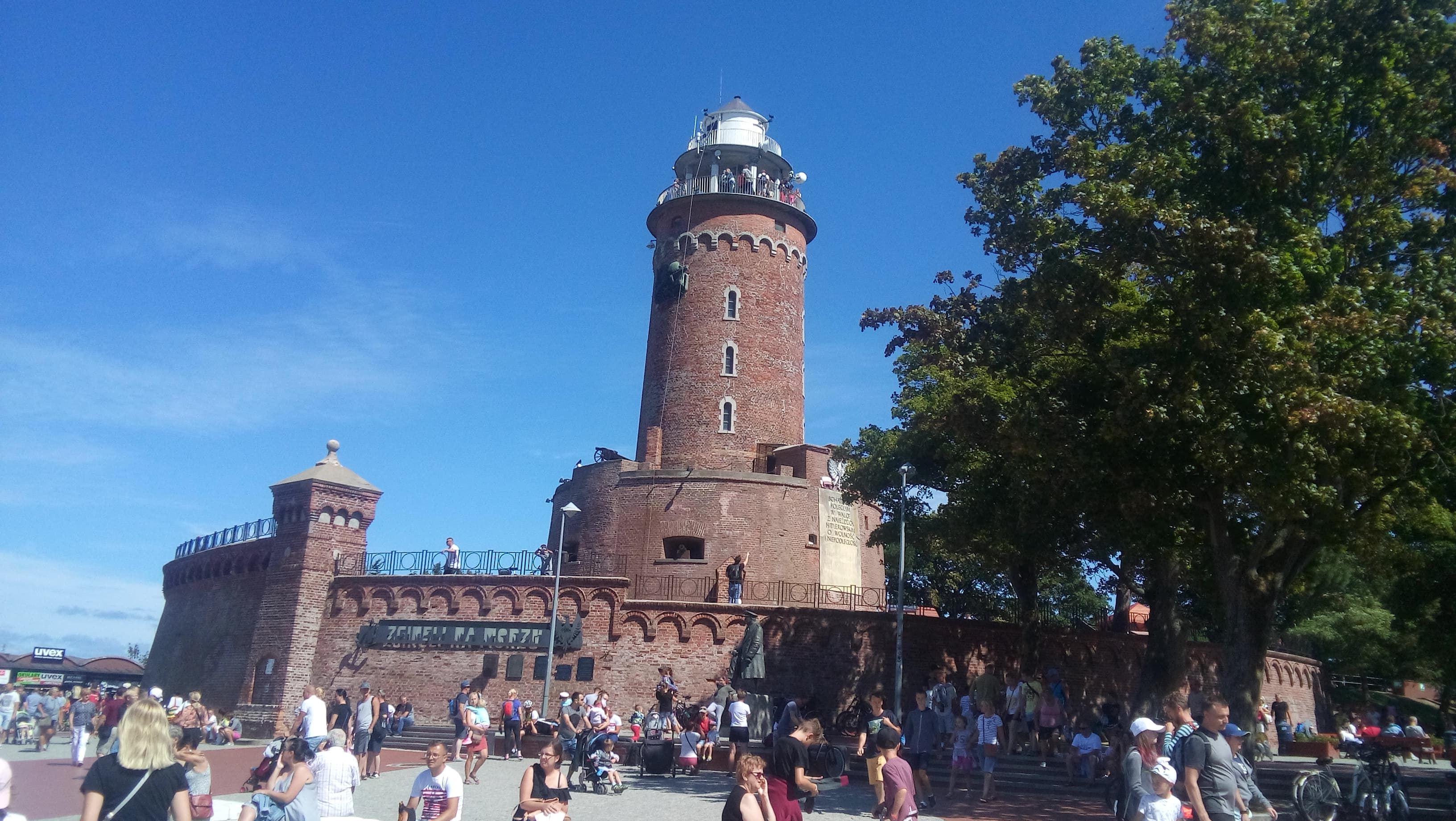 Latarnia morska w Kołobrzegu